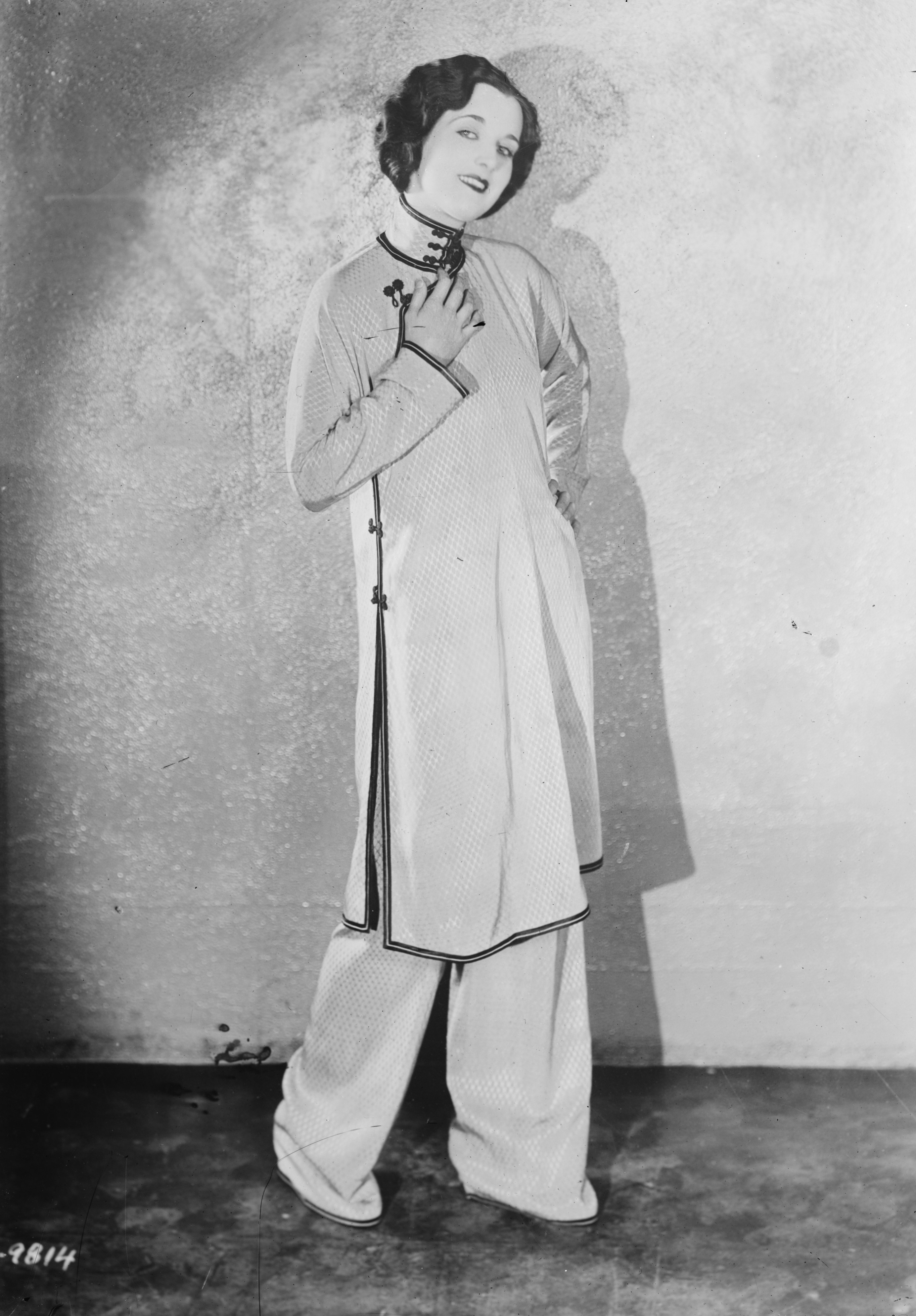 Actress Gertrude Olmstead